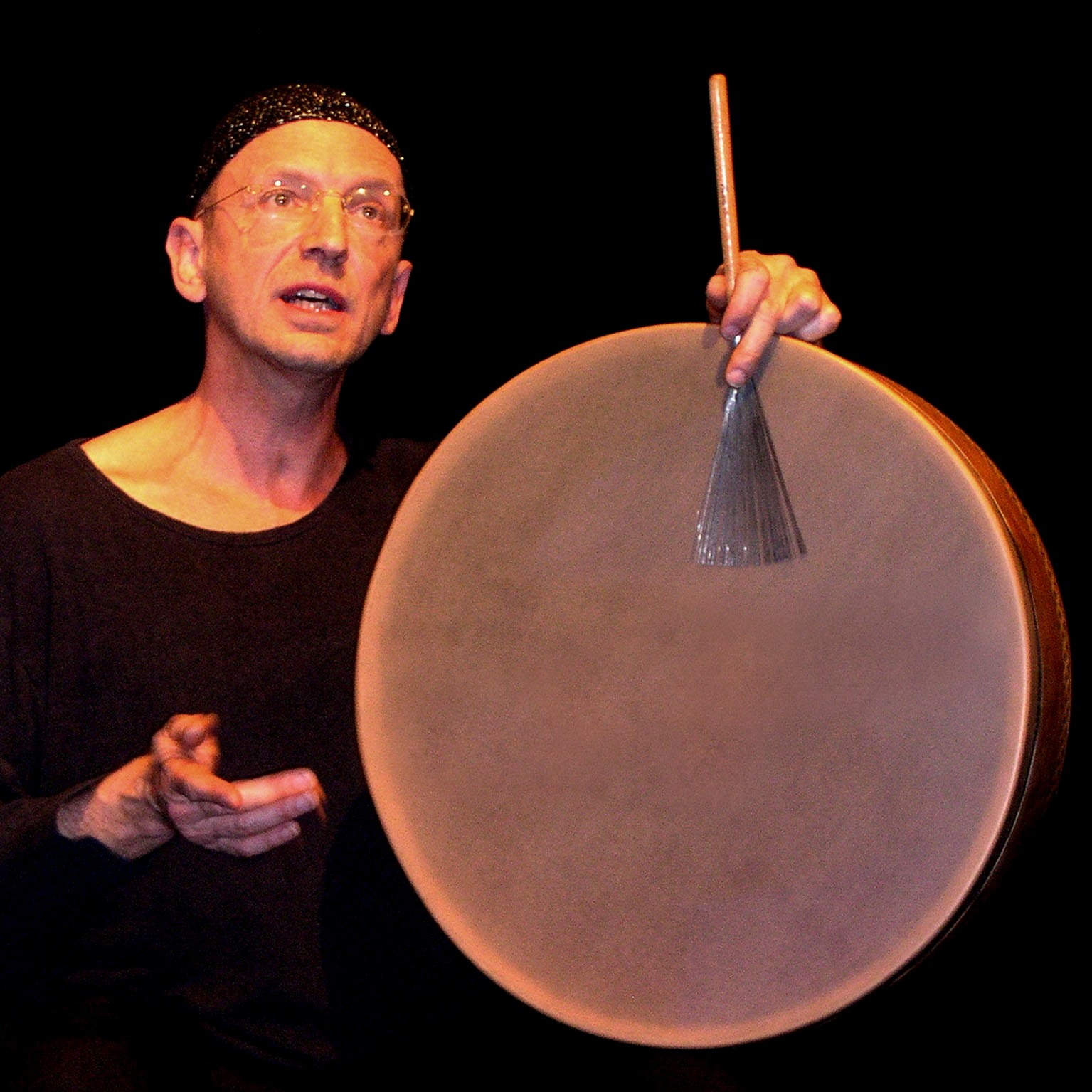 Christoph Haas spielt Bodhran